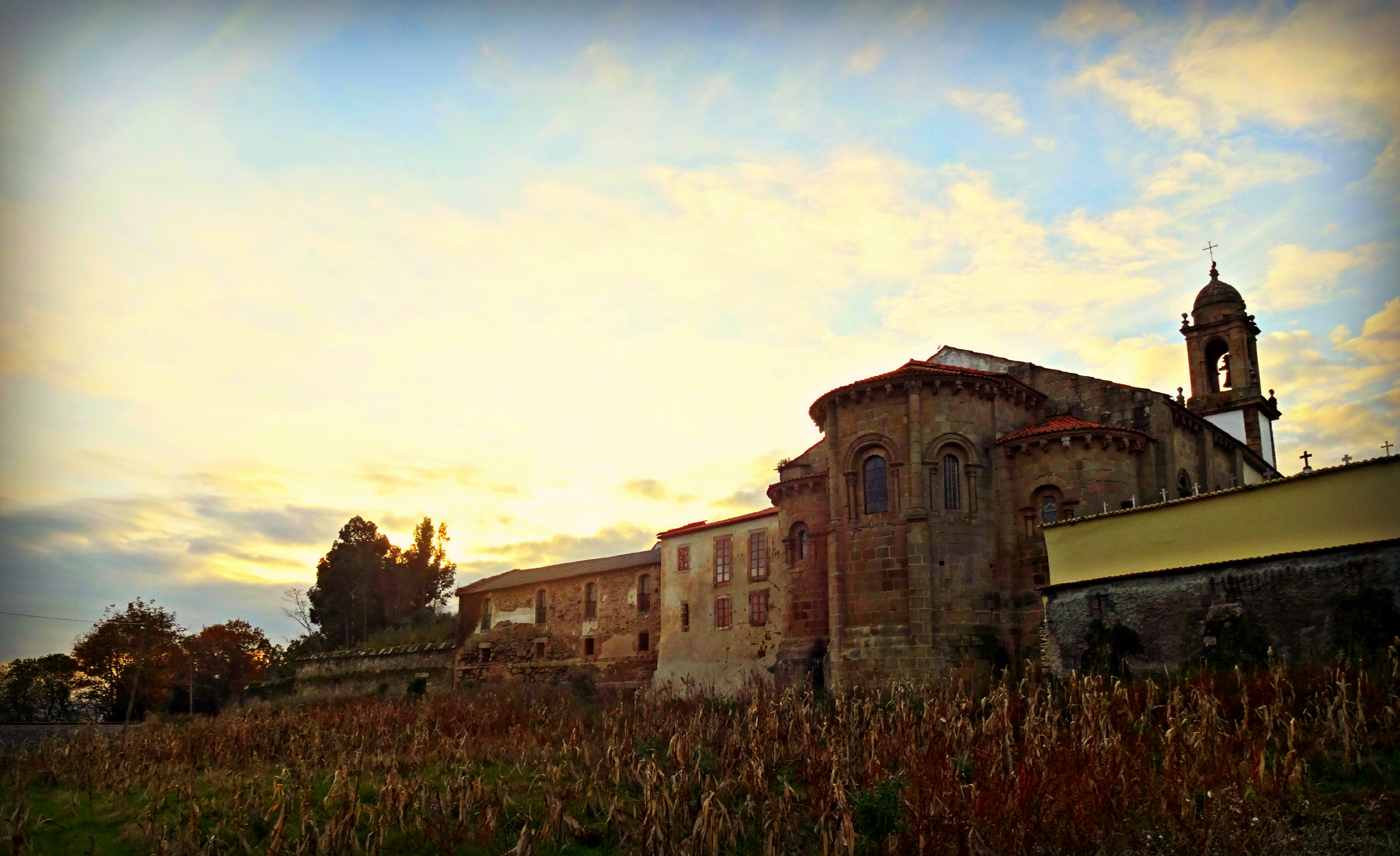 Monasterio de San Martín de Xuvia.